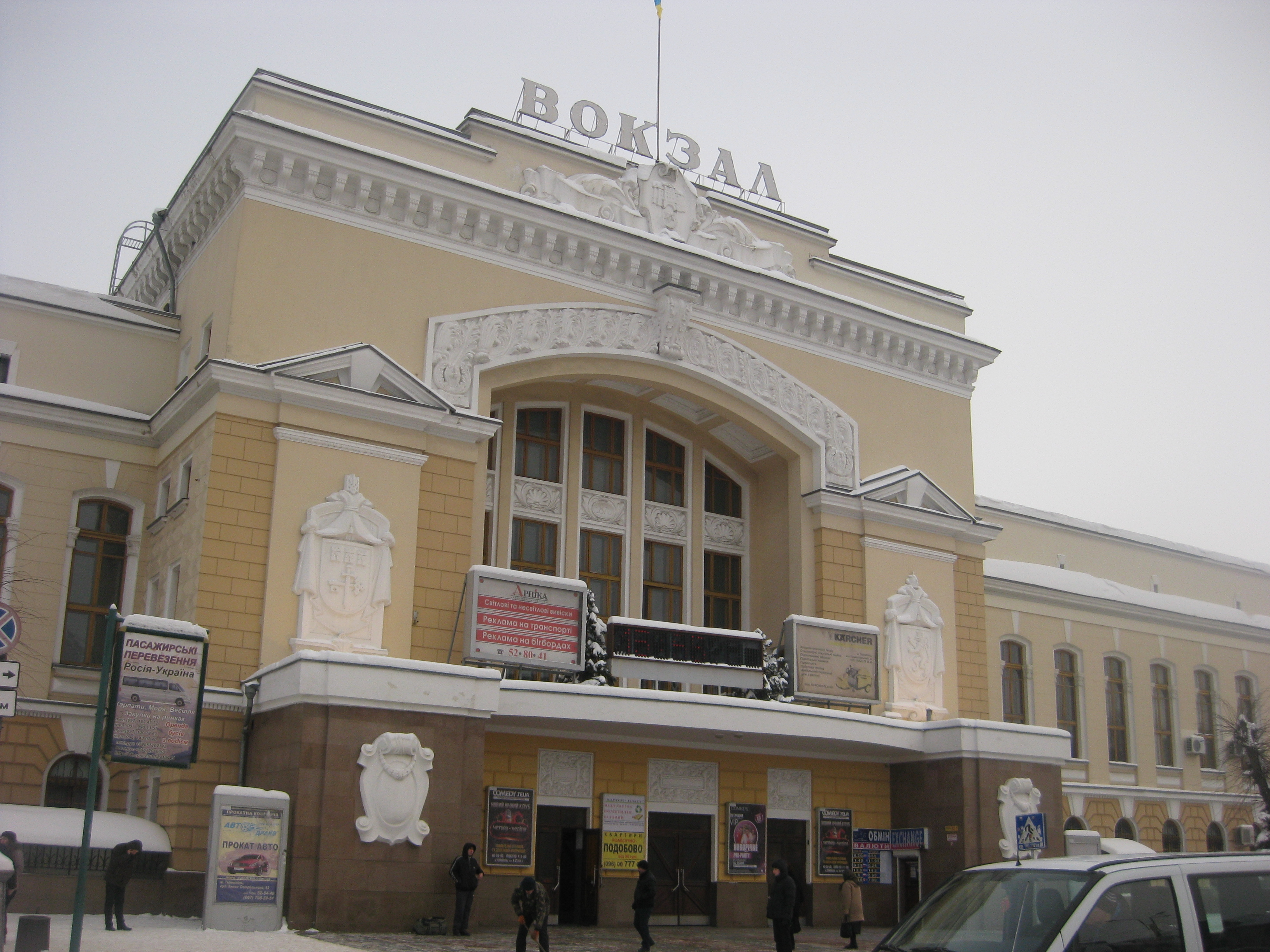 Вокзал ст. Тернопіль (мур.), Тернопіль, Майдан Привокзальний